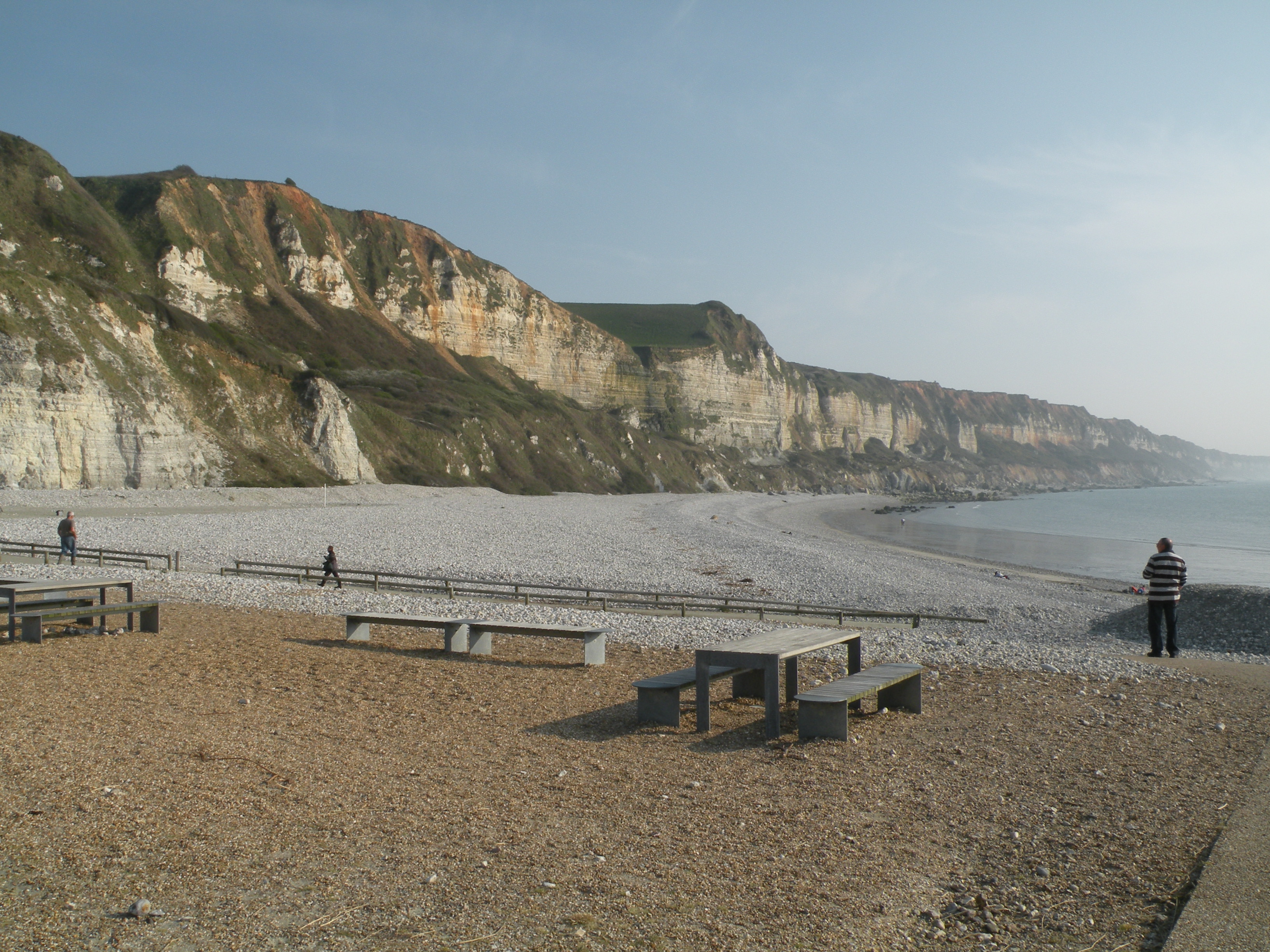 Saint-Jouin-Plage à Saint-Jouin-Bruneval.